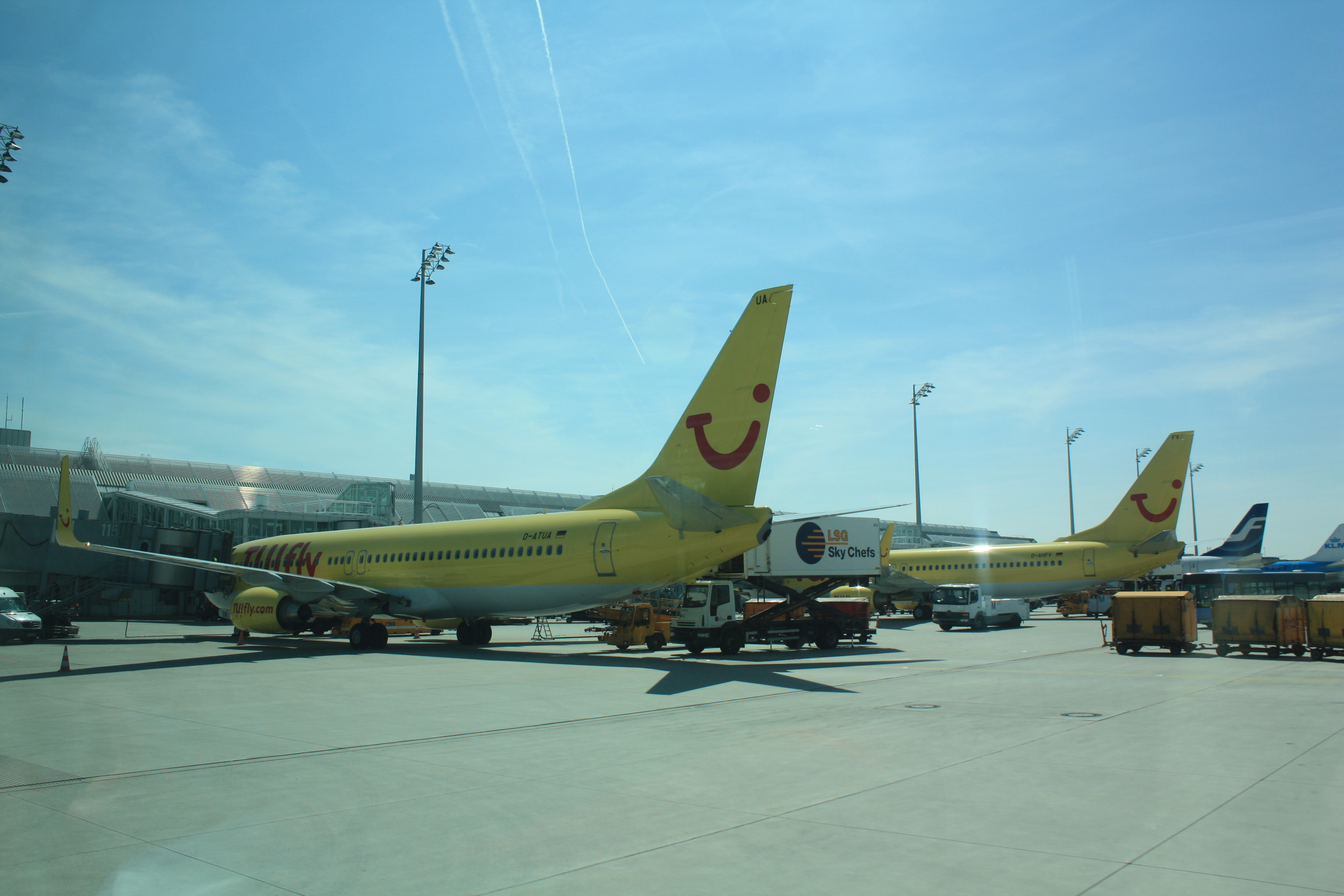 Flugzeuge der TUIfly am Terminal 1